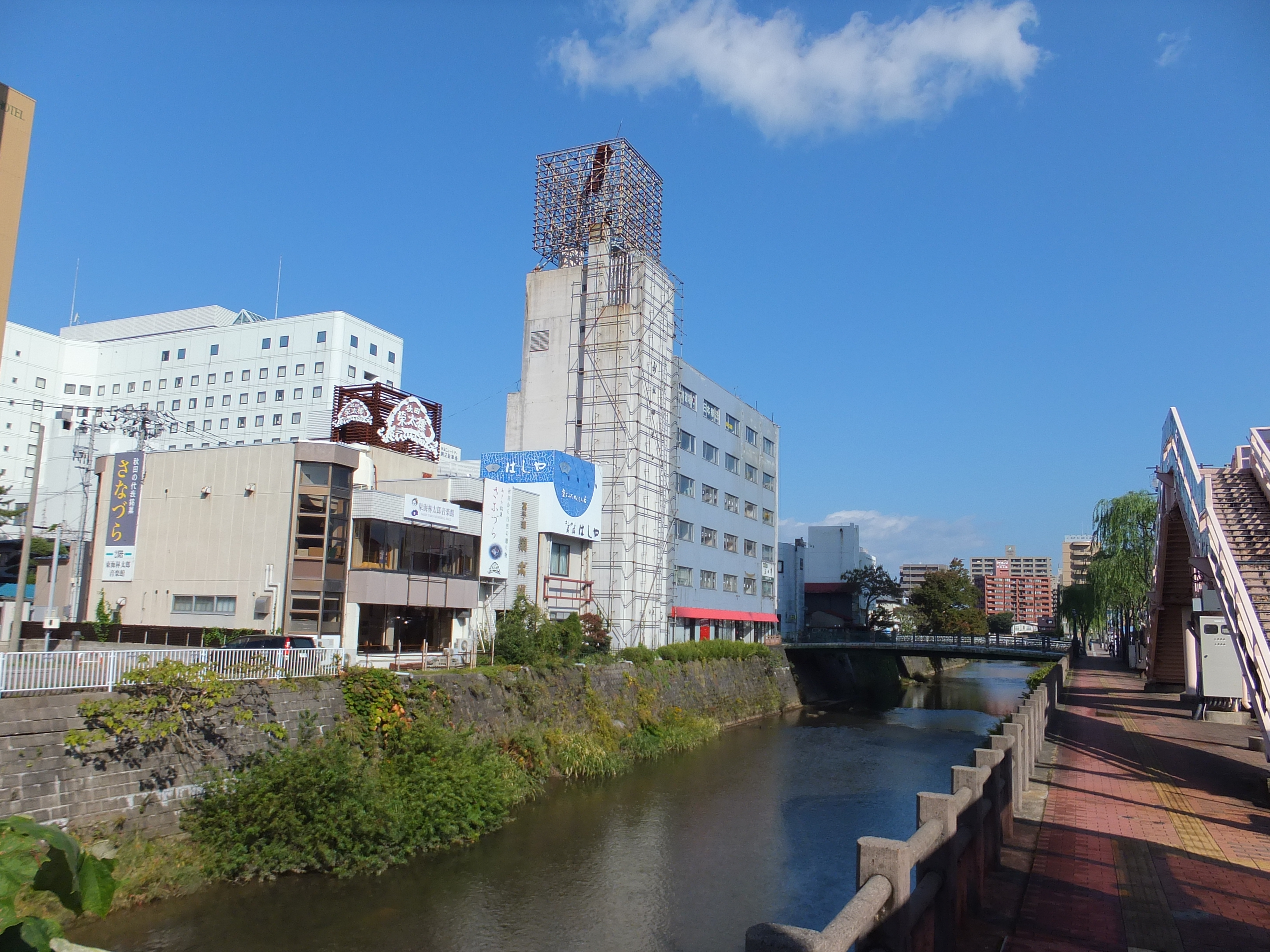 秋田市中心街を流れる旭川。二丁目橋より上流方を望む。